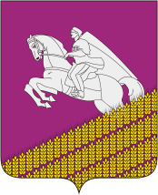 Герб Кущевского района Краснодарского края